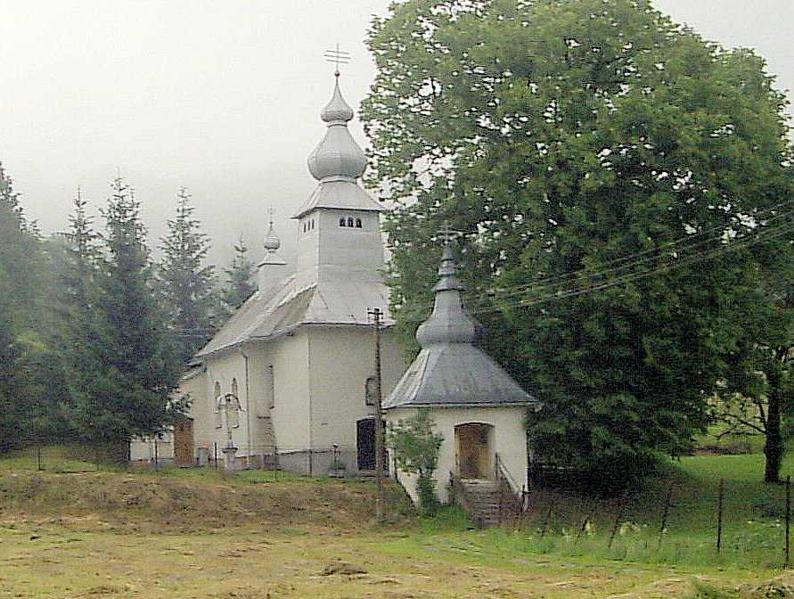 Breznica, Grécko-katolícky kostol